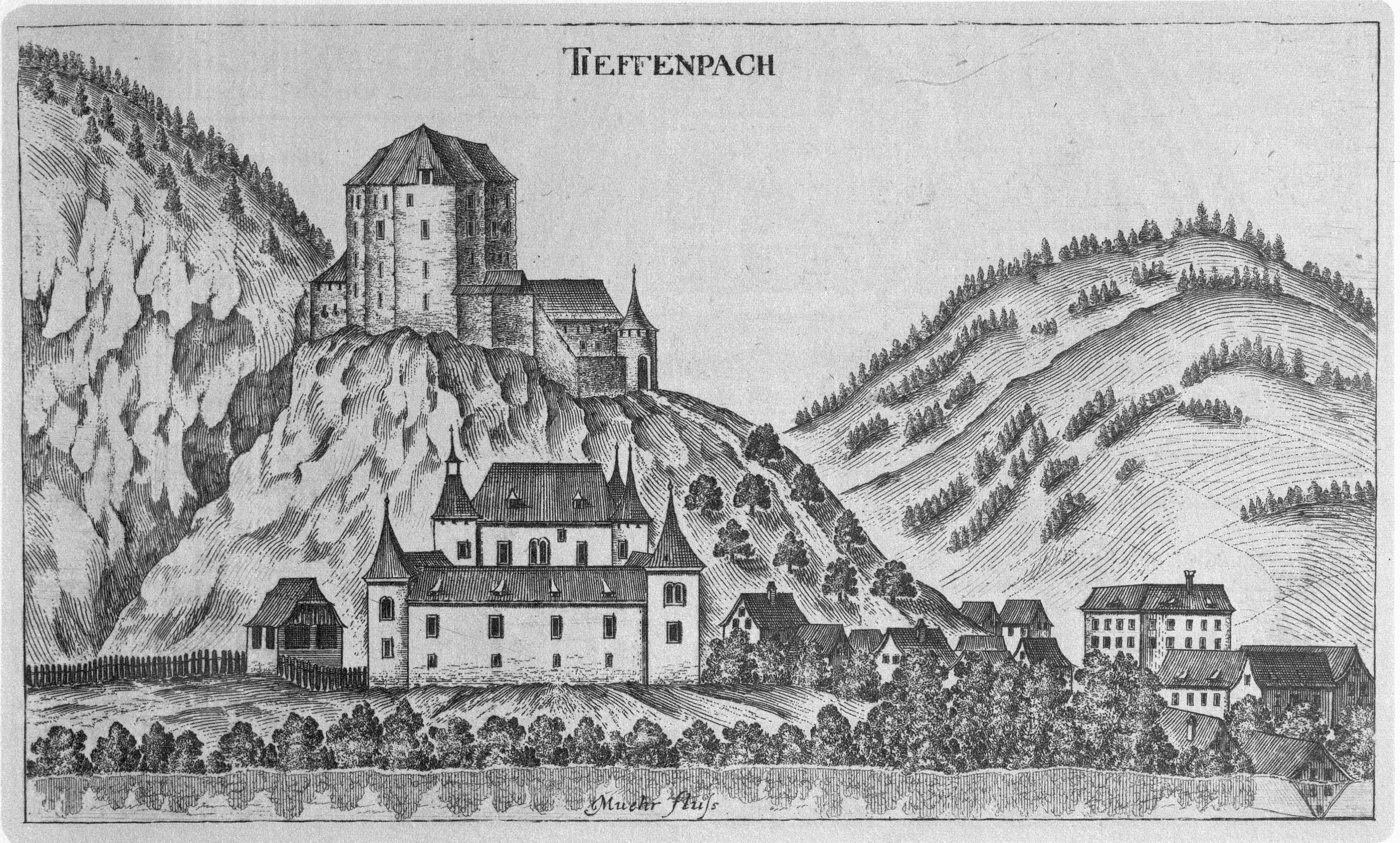 G. M. Vischers Käyserlichen Geographi, Topographia Ducatus Stiriae, Das ist: Eigentliche Delineation / und Abbildung aller Städte / Schlösser / Marcktfleck / Lustgärten / Probsteyen / Stiffter / Clöster und Kirchen / so es sich im Herzogthumb Steyrmarck befinden; Und anjetzo Umb einen billichen Preyß zu finden seynd Bey Johann Bitsch Universitäts Buchhandlern / Auff dem Juden=Platz bey der guldenen Saulen. Graz 1681 Die Nummerierung der Dateien folgt der alphabetischen Reihung der Ortsnamen und entspricht nicht dem Vischer-Register